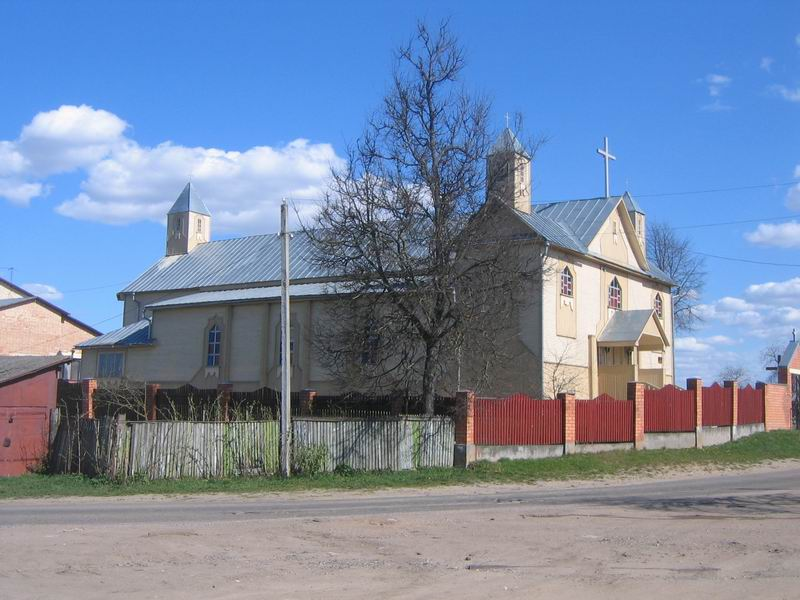 Беларуская (тарашкевіца): Койданаў (Kojdanaŭ)